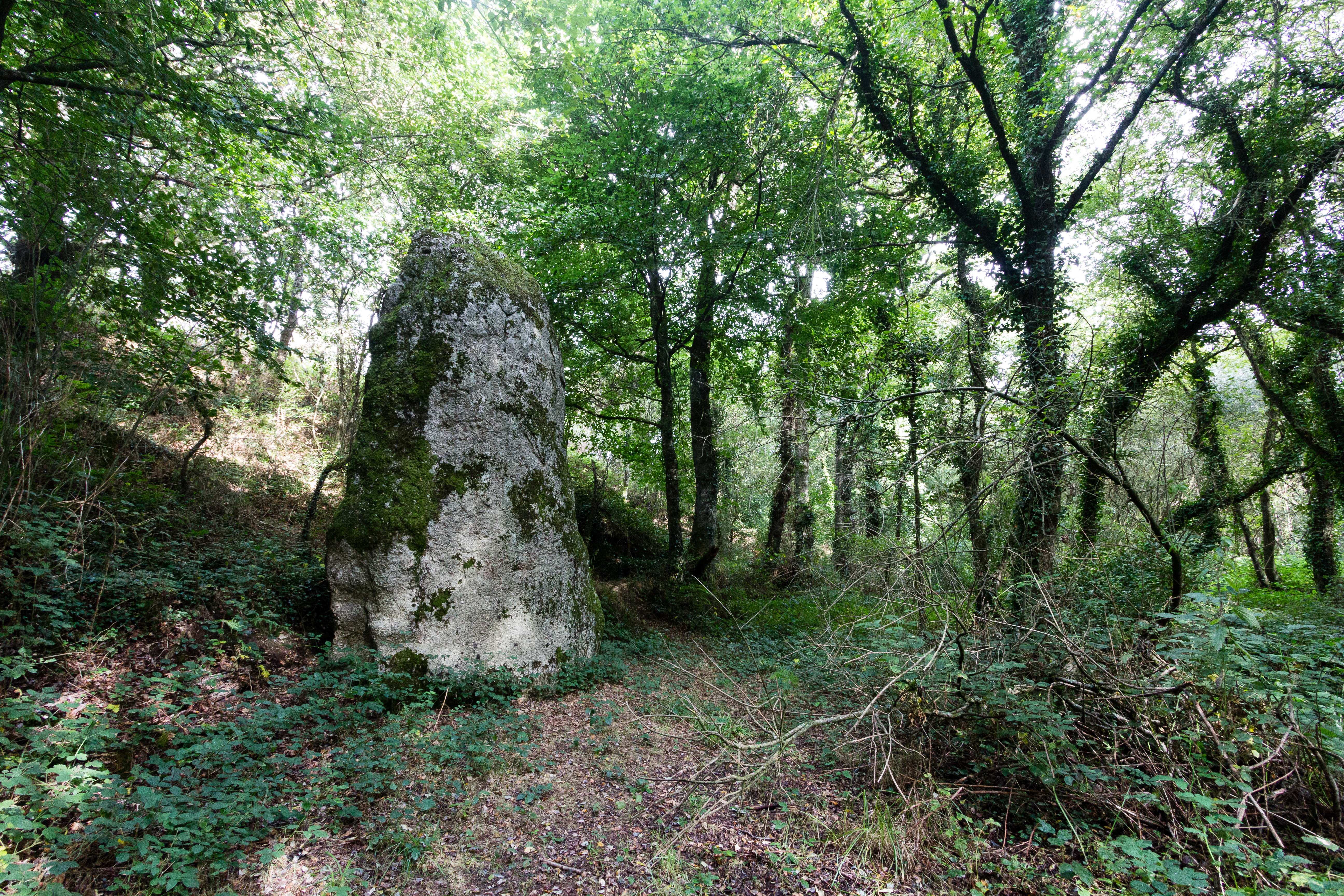 Menhir dit « le Fuseau » à Plaine-Haute (France).